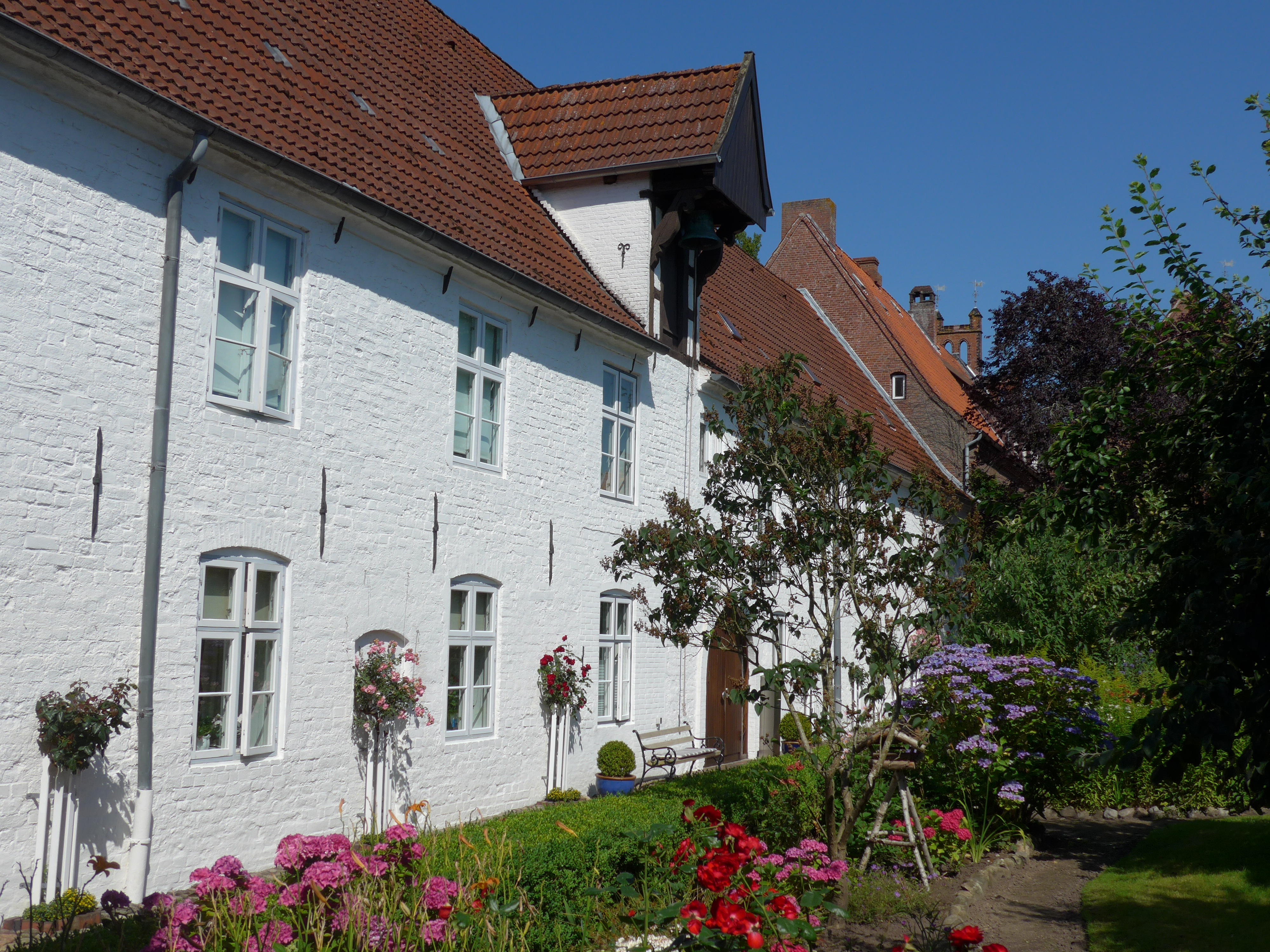 Husum, St.-Jürgen-Gasthaus, gartenseitiger Flügel mit Eingang zur Kapelle, 16. Jahrhundert und später.